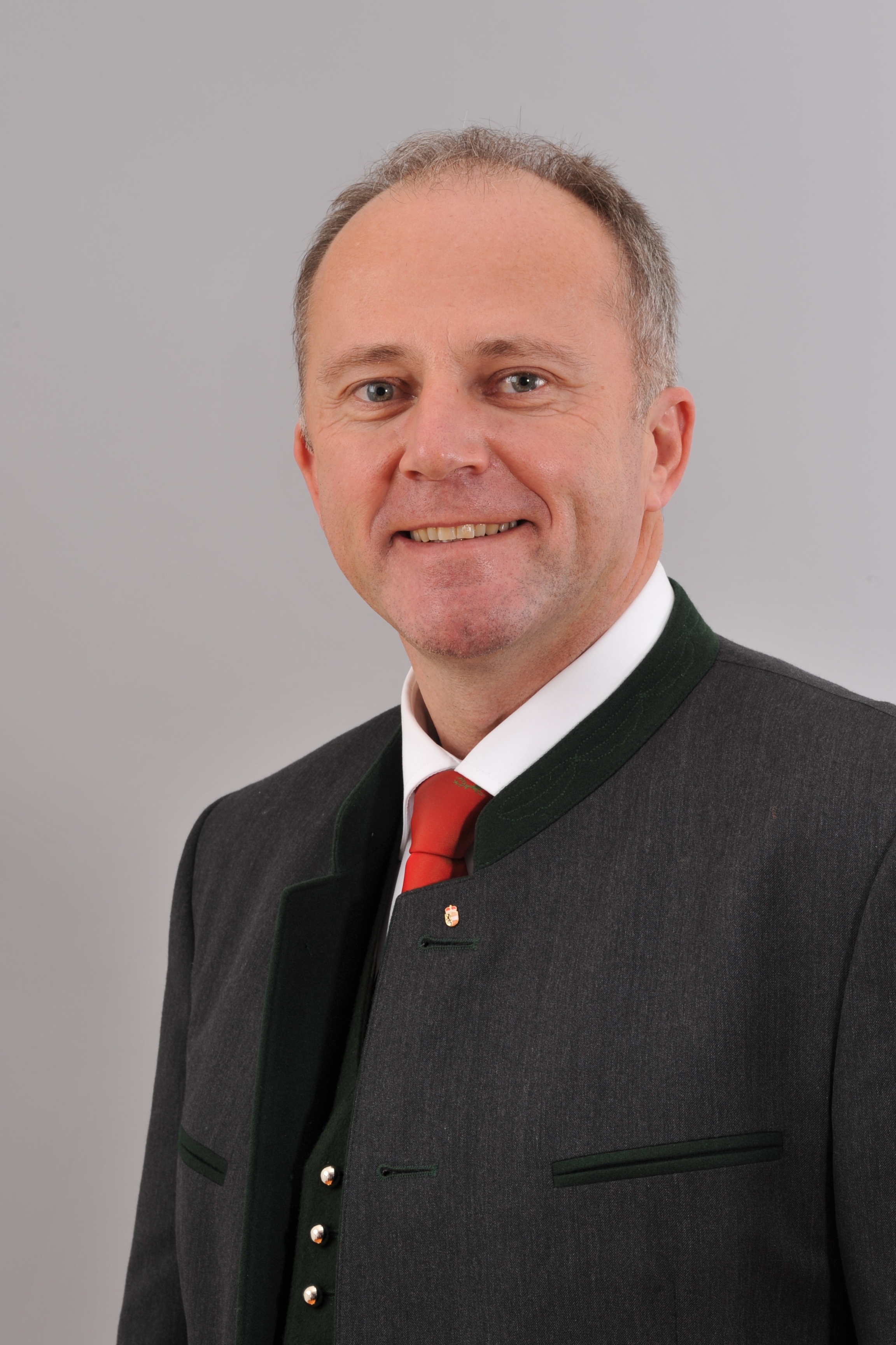 Landtagsprojekt Salzburg: Josef Eisl